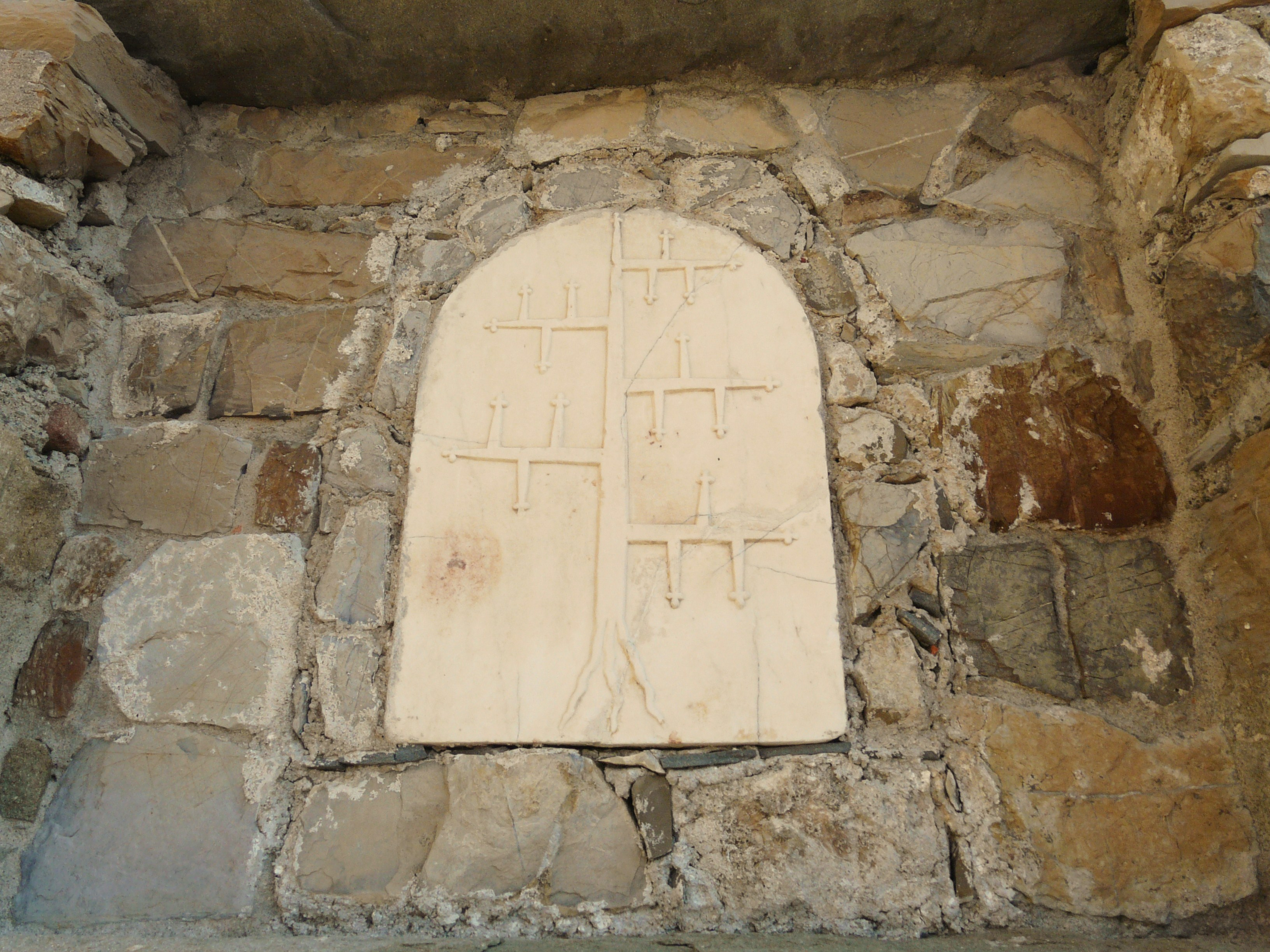 Castello Malaspina, Fosdinovo, Toscana, Italia